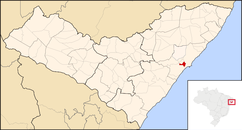 Alagoas_Municip_CoqSeco